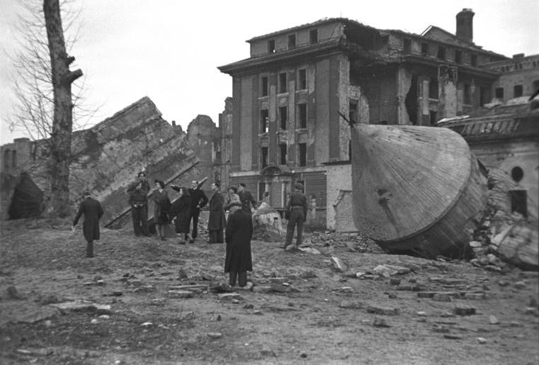 ADN-ZB/Donath Berlin: Die im II. Weltkrieg zerstörte Reichskanzlei, rechts ein gesprengter Unterstand für die Wachmannschaft. Aufn. 1947